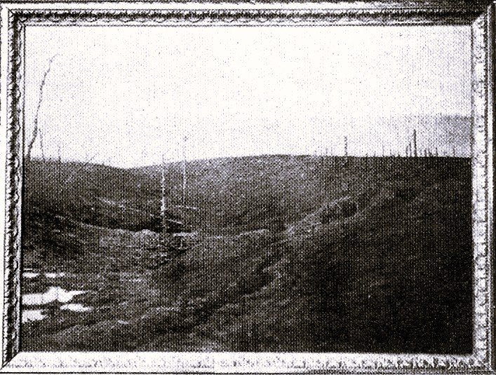 Die Gießler Höhe (Gemälde f. d. Nachbar-IR 163)